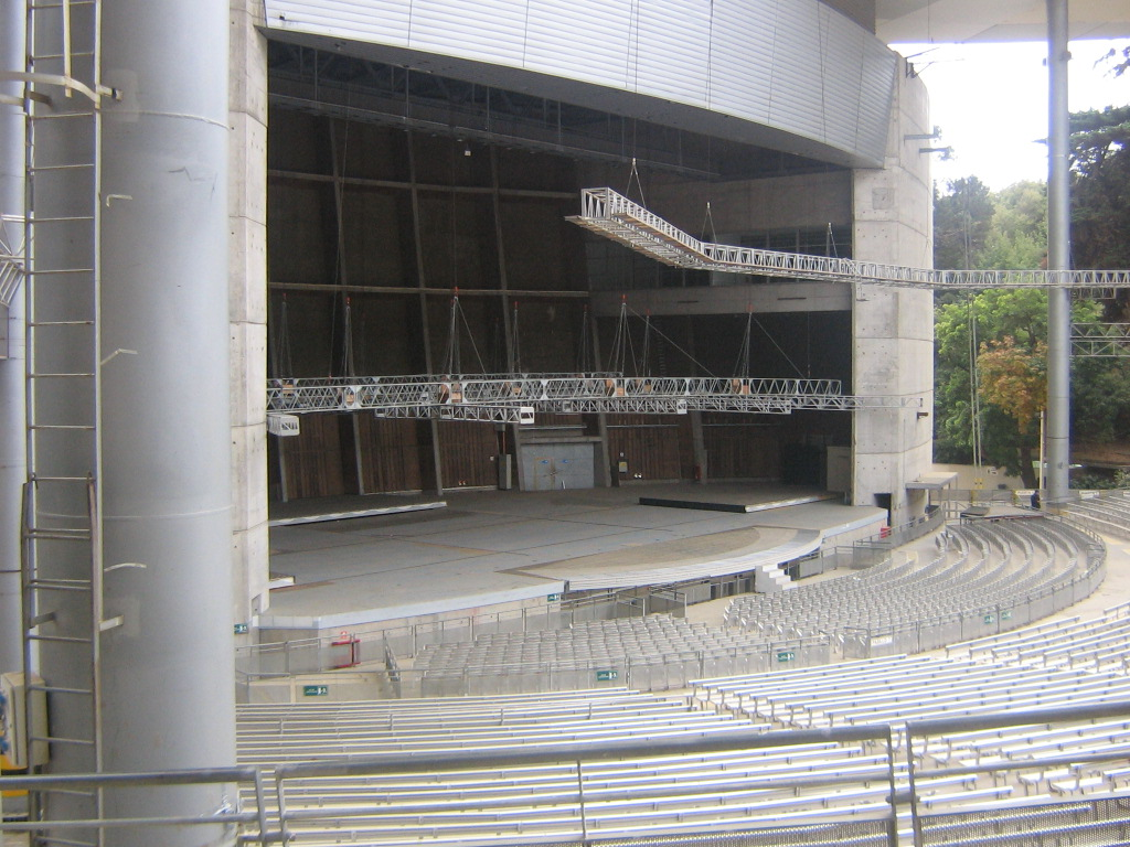 Trabajo Propio